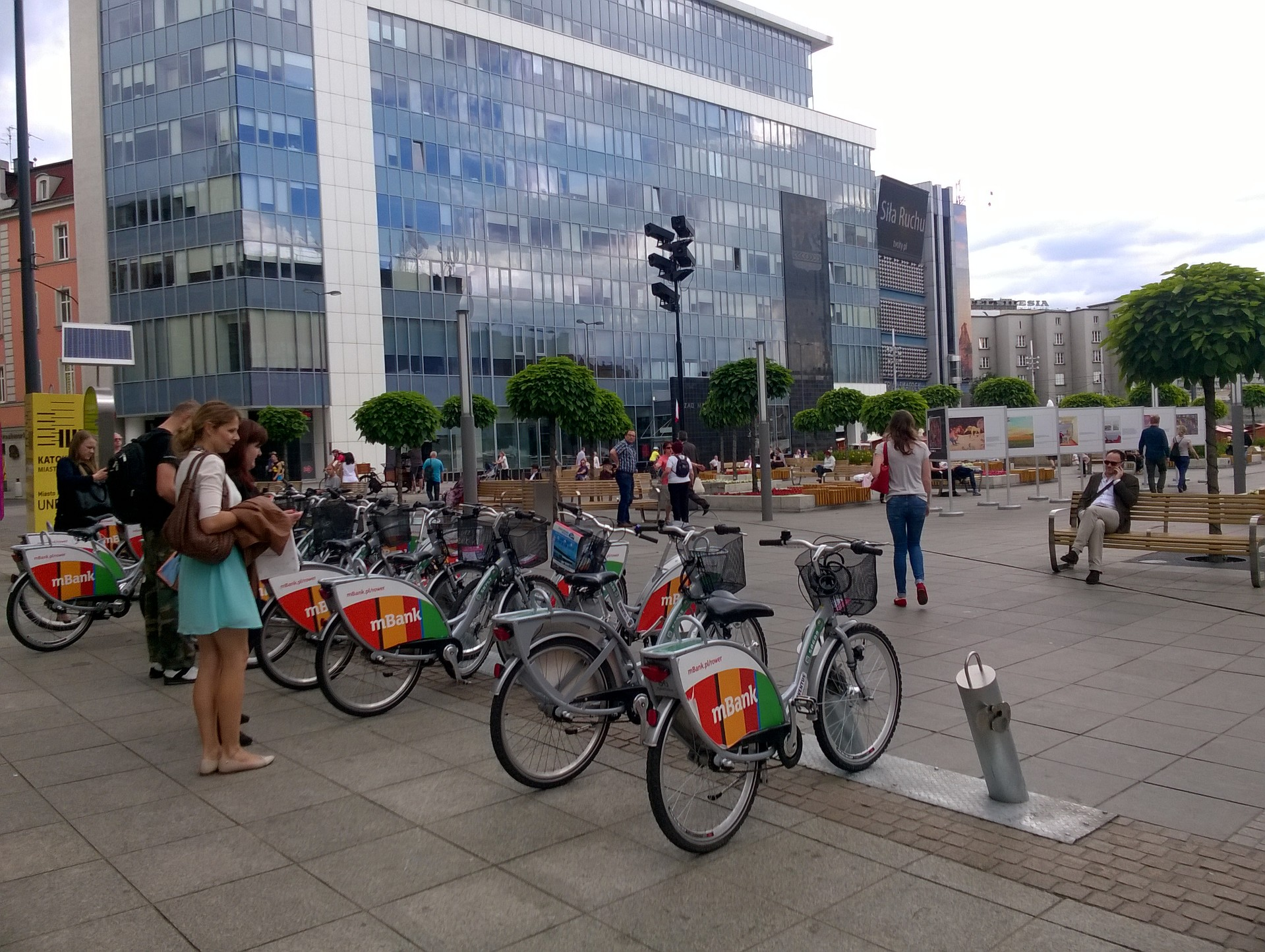 City by bike - stacja Katowice Rynek